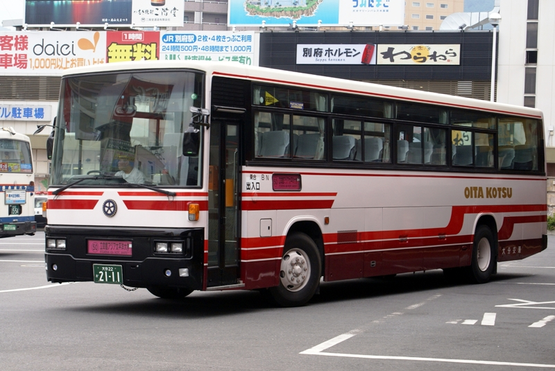 大分交通KC-RA531RBN